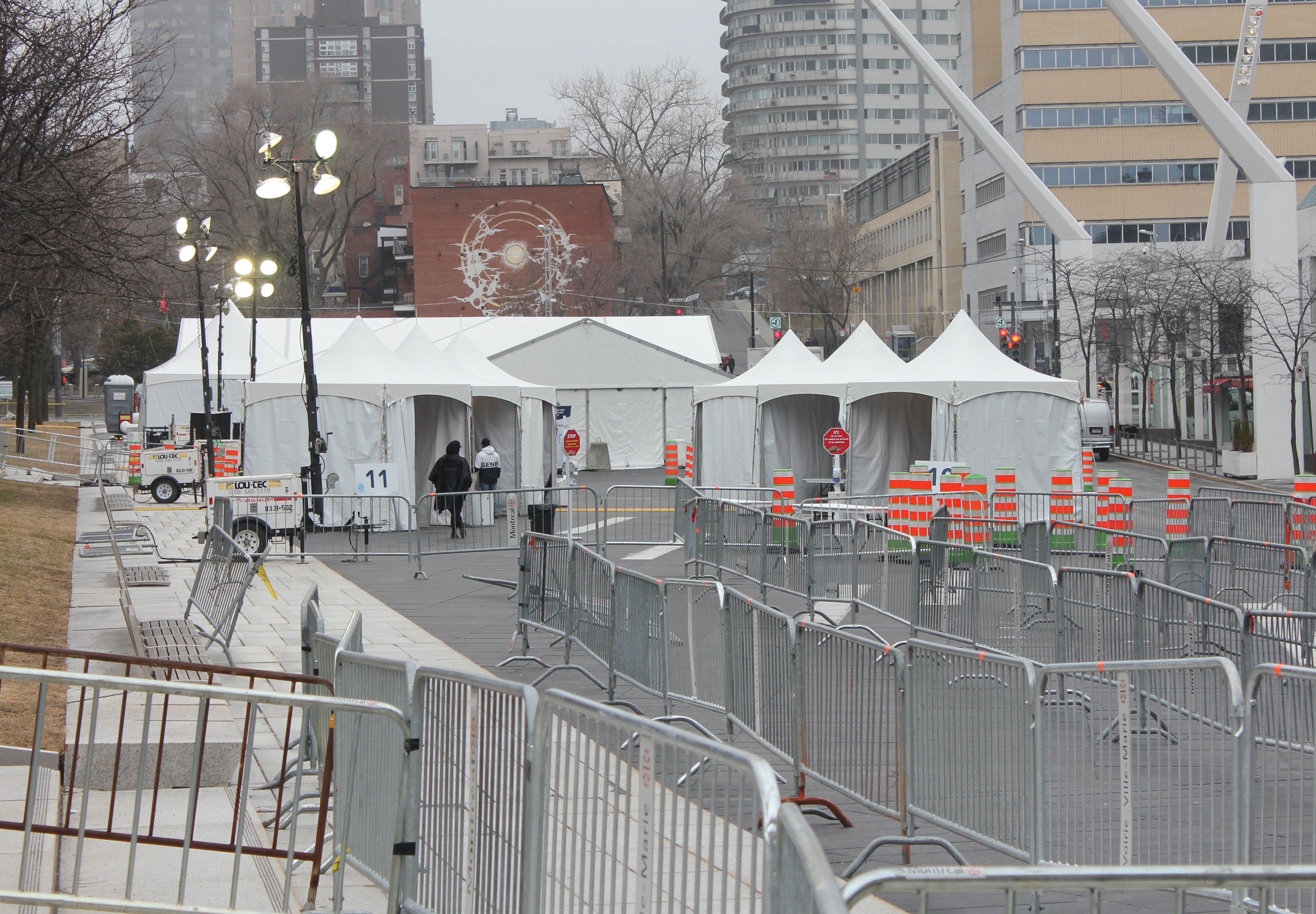 Clinique temporaire COVID19 à Place des Arts Montréal, 3 avril 2020